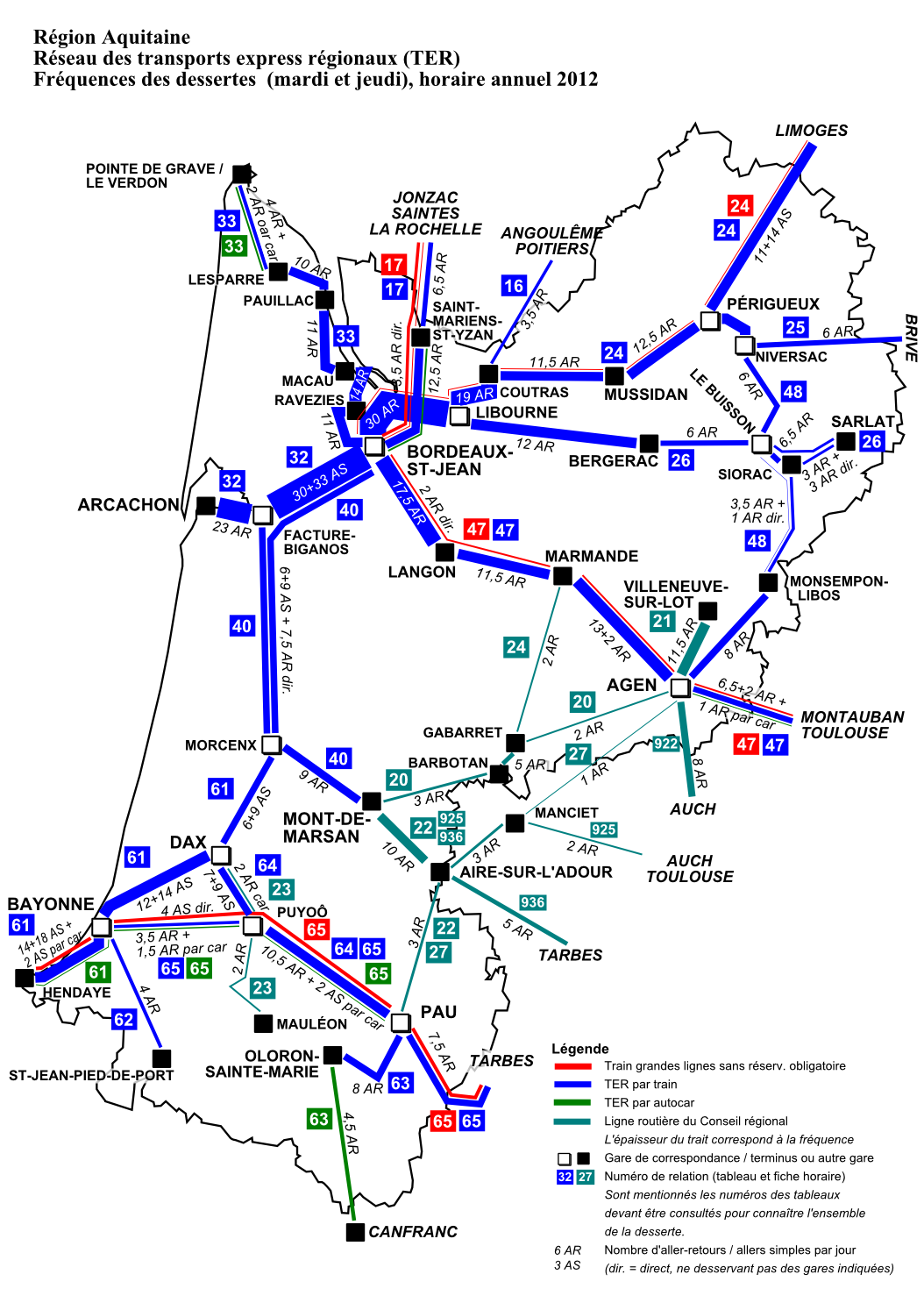 TER Aquitaine, fréquence de la desserte les jours-type de pleine semaine (mardi et jeudi), horaire annuel 2012